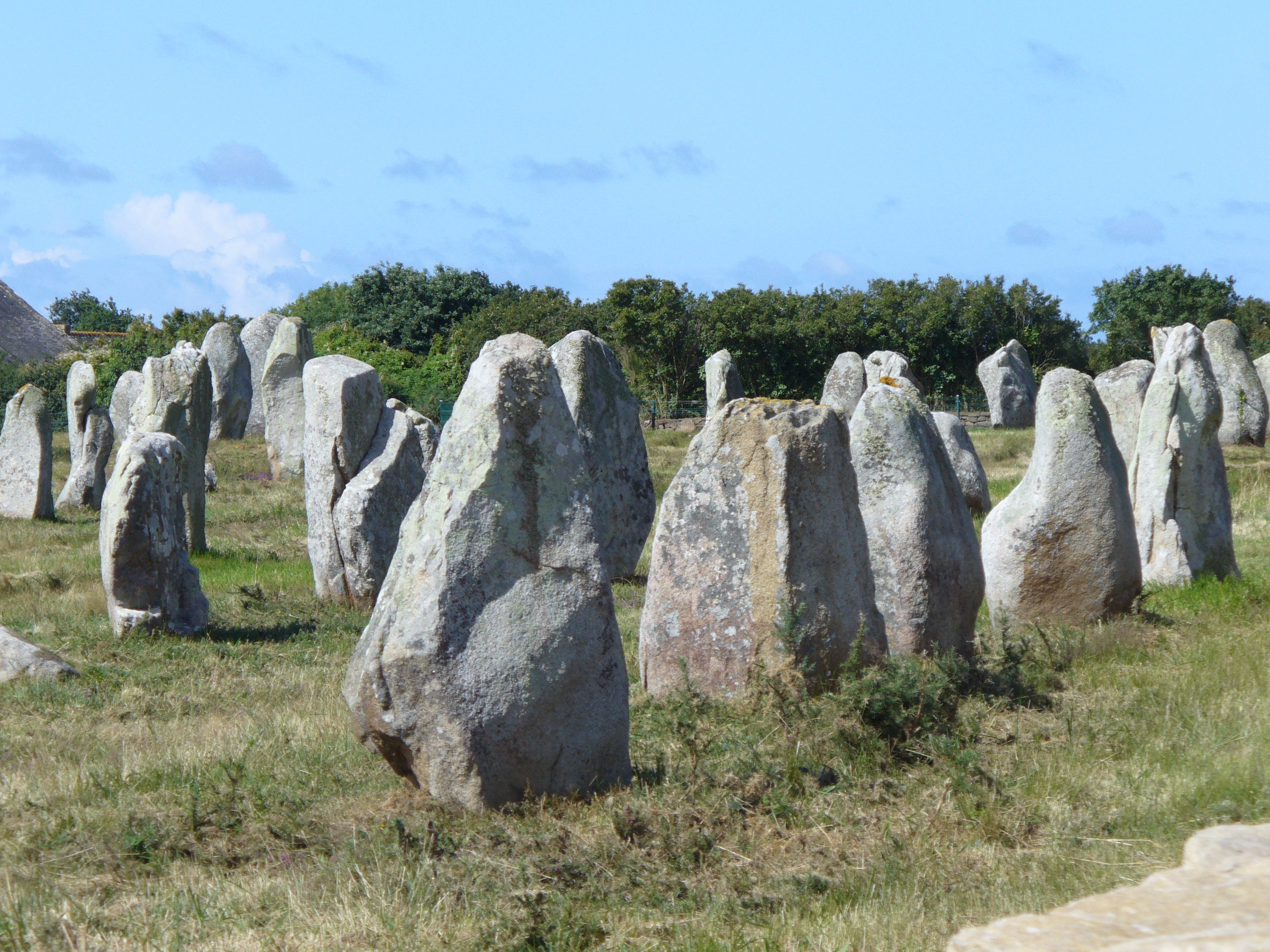 1099 Menhire,bis zu 4 Meter hoch,von Ost nach West in 1167 Meter Langen Alignements(Steinreihen) in einem Halbkreis(Cromlechs) endend. (Jungsteinzeit, Neolithikum ,Neolithic ,Néolithique 4500-2300 v.Chr.) Megalithanlage von Le Ménec, Carnac ,Departement Morbihan ,Bretagne